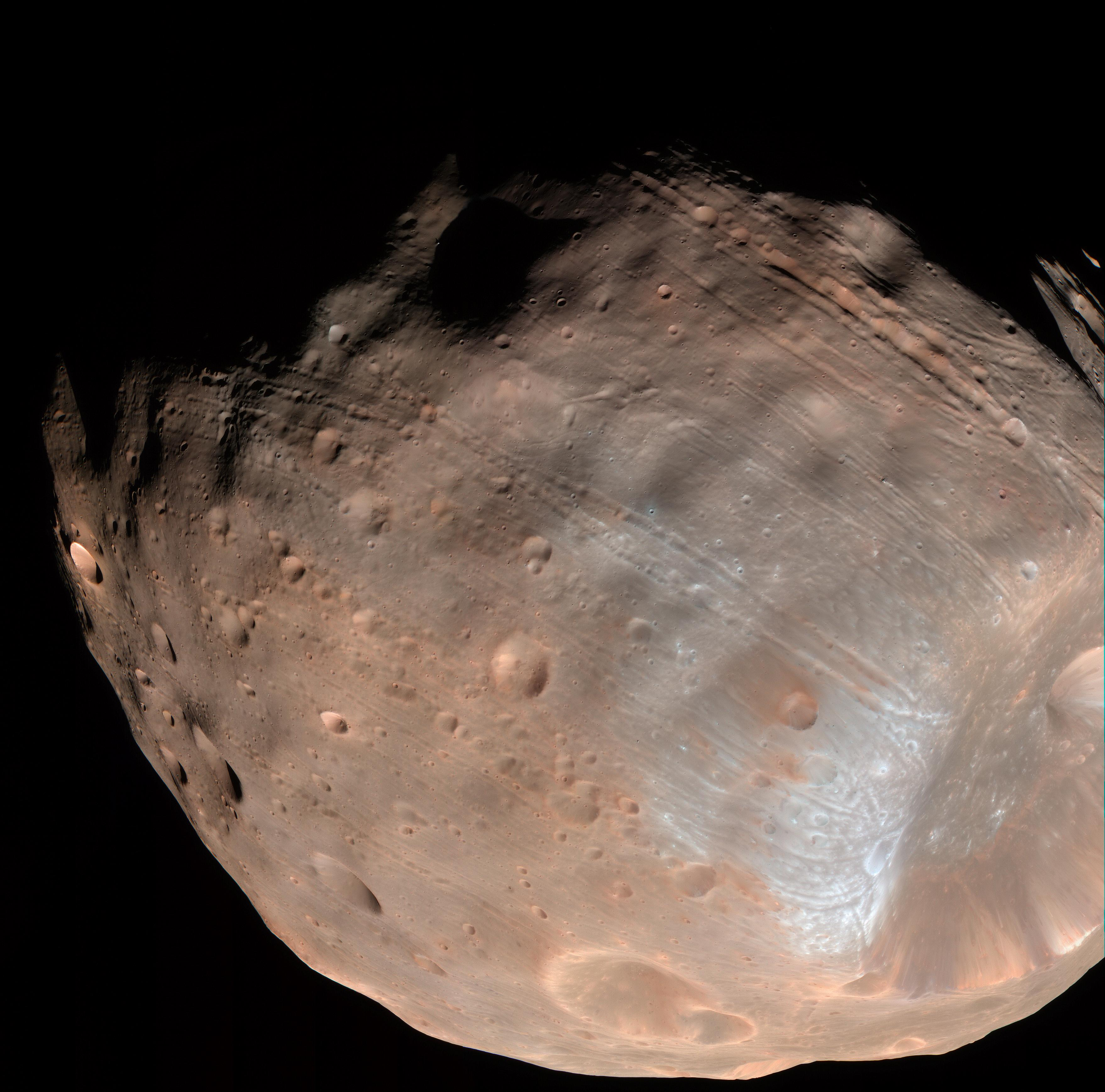 Phobos